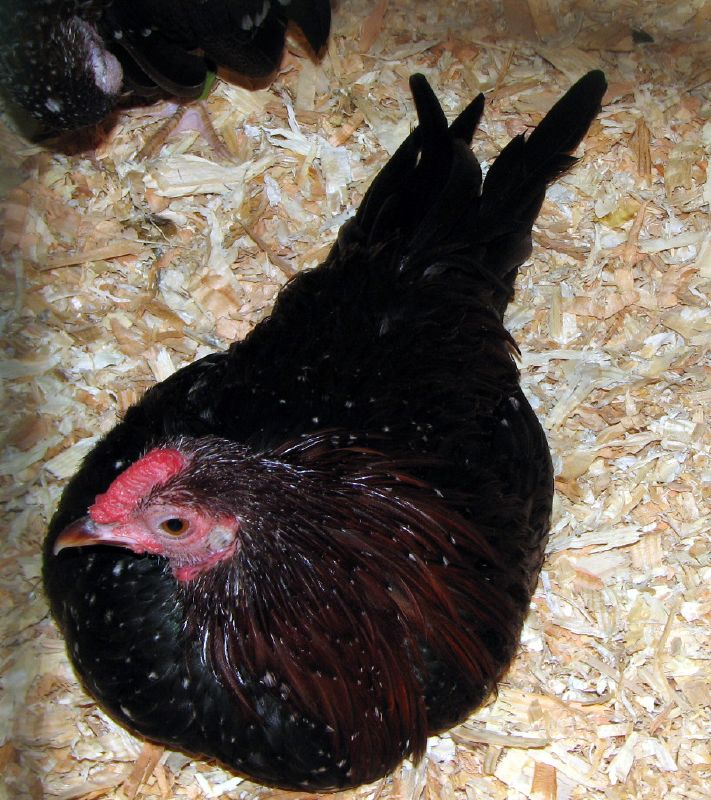 Australorp